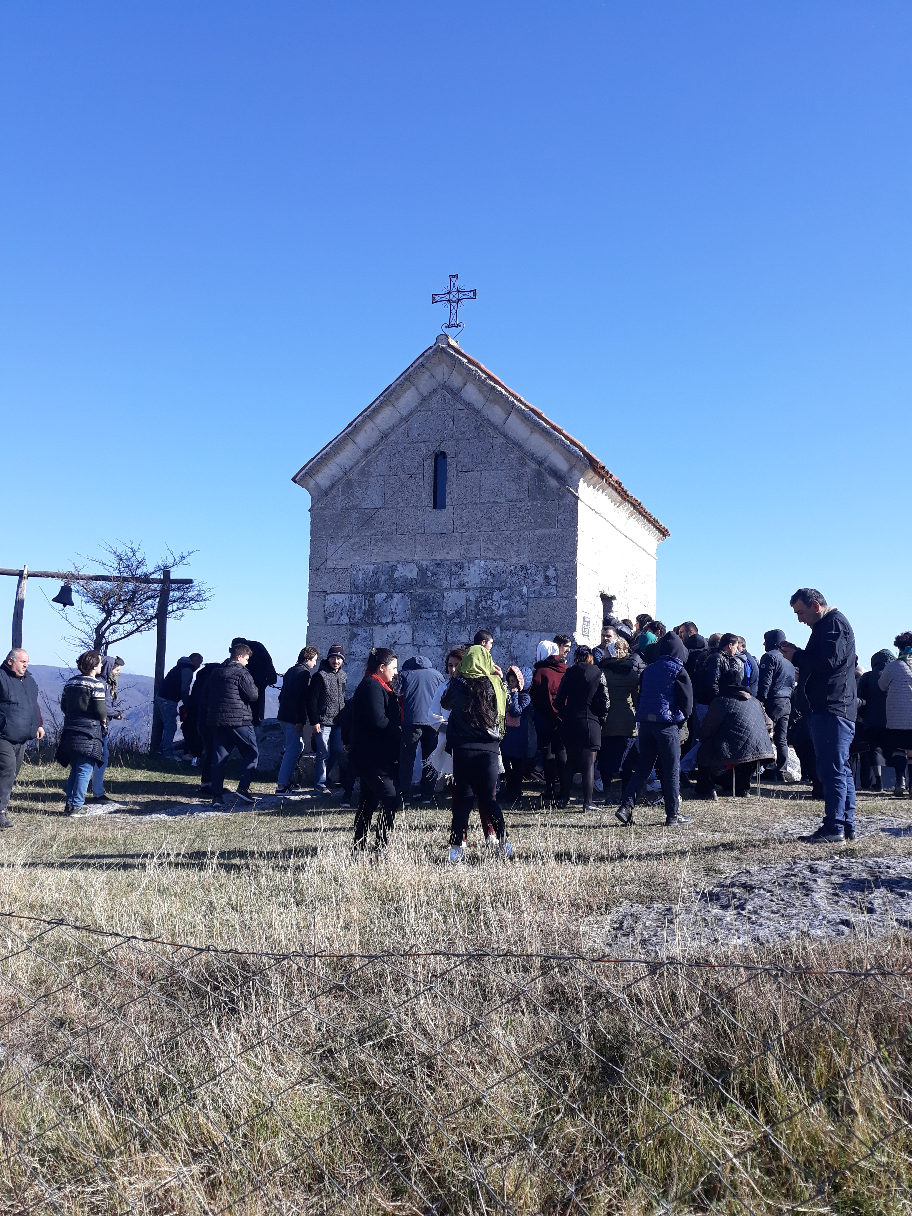 კოზმანის ეკლესია, კოზმანობის დღესასწაულზე 2019 წელს